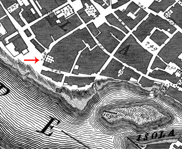 Estratto della pianta del Nolli con l'indicazione della demolita chiesa dei Santi Vincenzo e Anastasio alla Regola